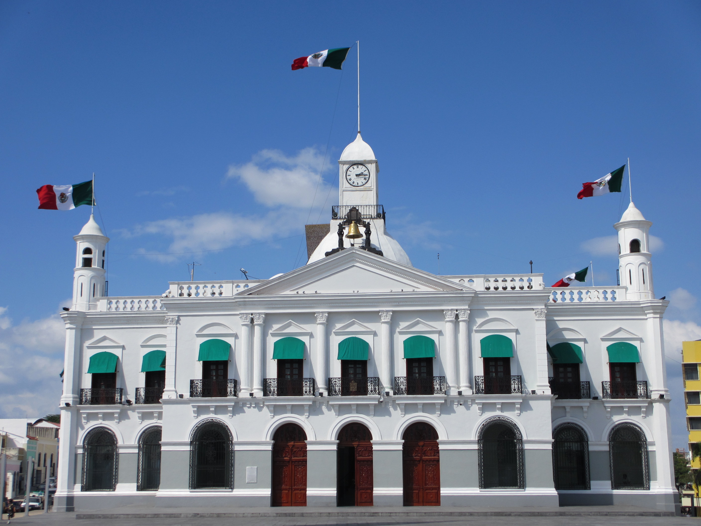 Palacio de Gobierno de Tabasco Su construcción inició en 1884 siendo gobernador Manuel Mestre Gorgoll y fue inaugurado el 13 de diciembre de 1894 por el gobernador Simón Sarlat Nova, uno de sus principales promotores.